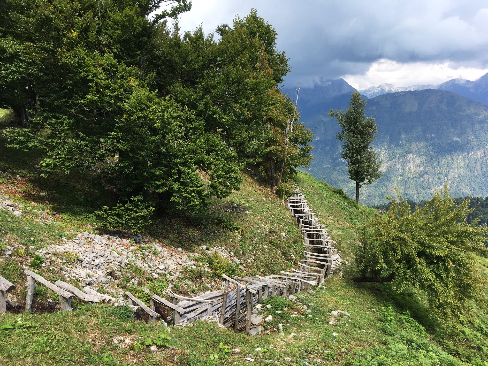 Die Schützengräben am Bergkamm des Freilichtmuseums am Kolovrat (1115 m) in Slowenien sind Überreste der Kämpfe an der Isonzo Front, während des I. Weltkrieges.